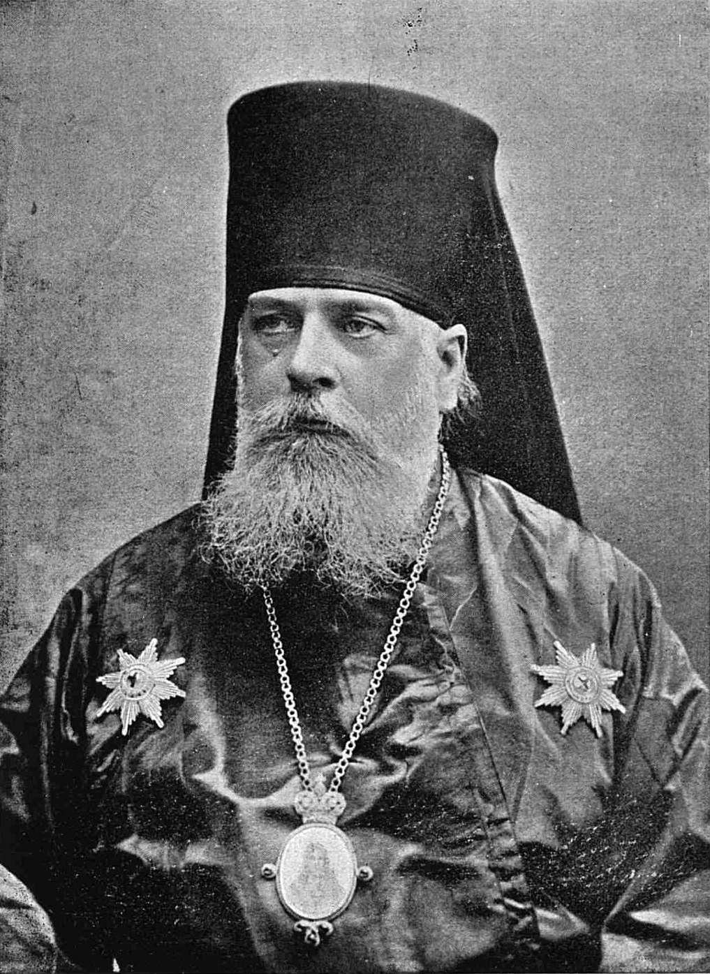 епископ Серафим (Чичагов)